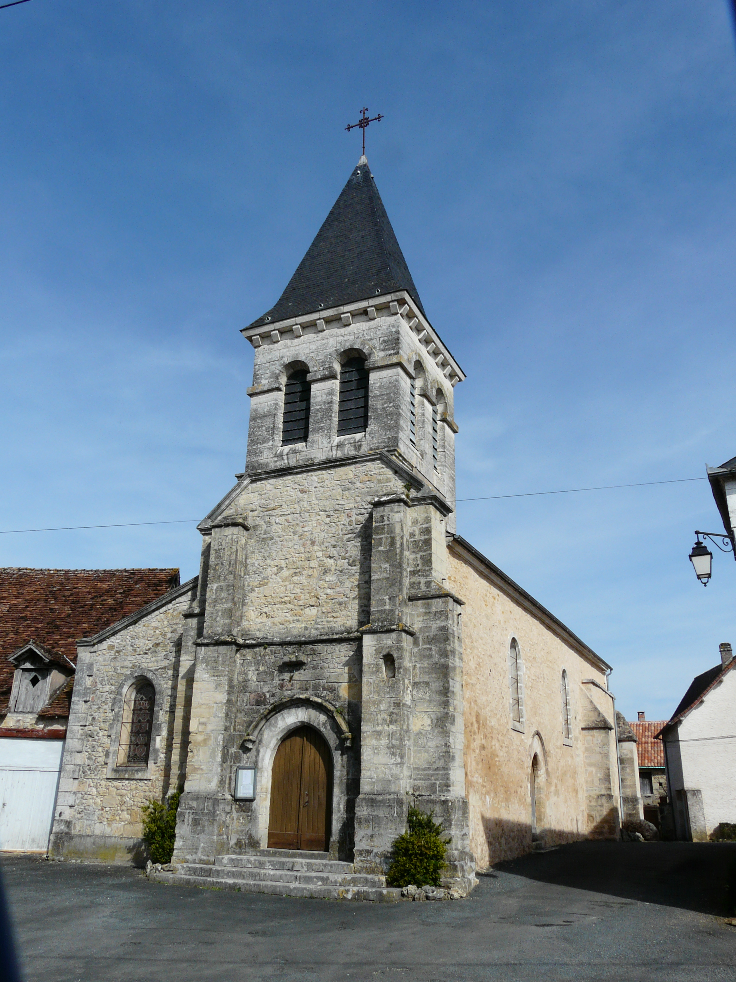 L'église Saint-Roch, Cherveix-Cubas, Dordogne, France